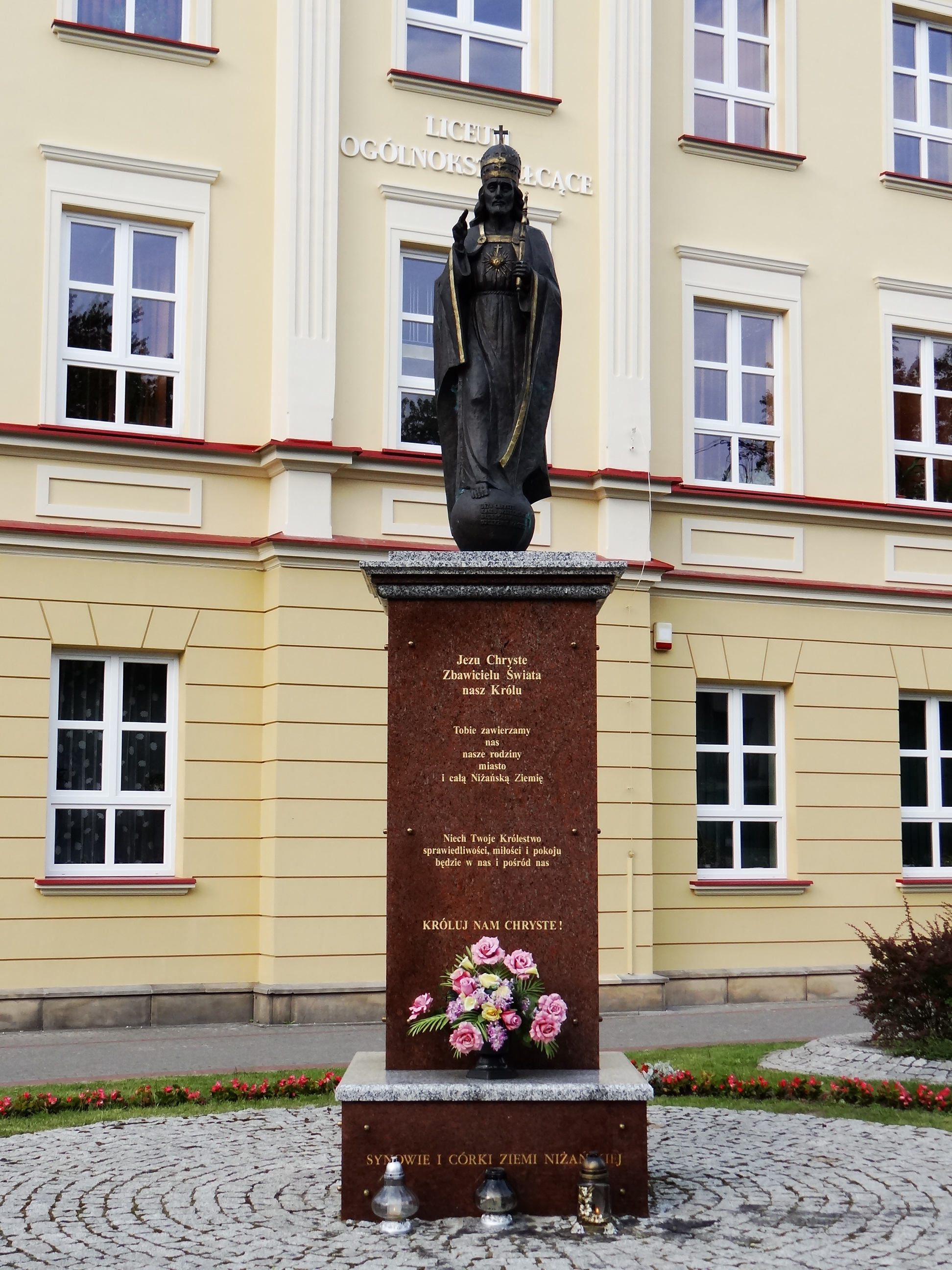 Zdjęcie wykonane w miejscowości Nisko.